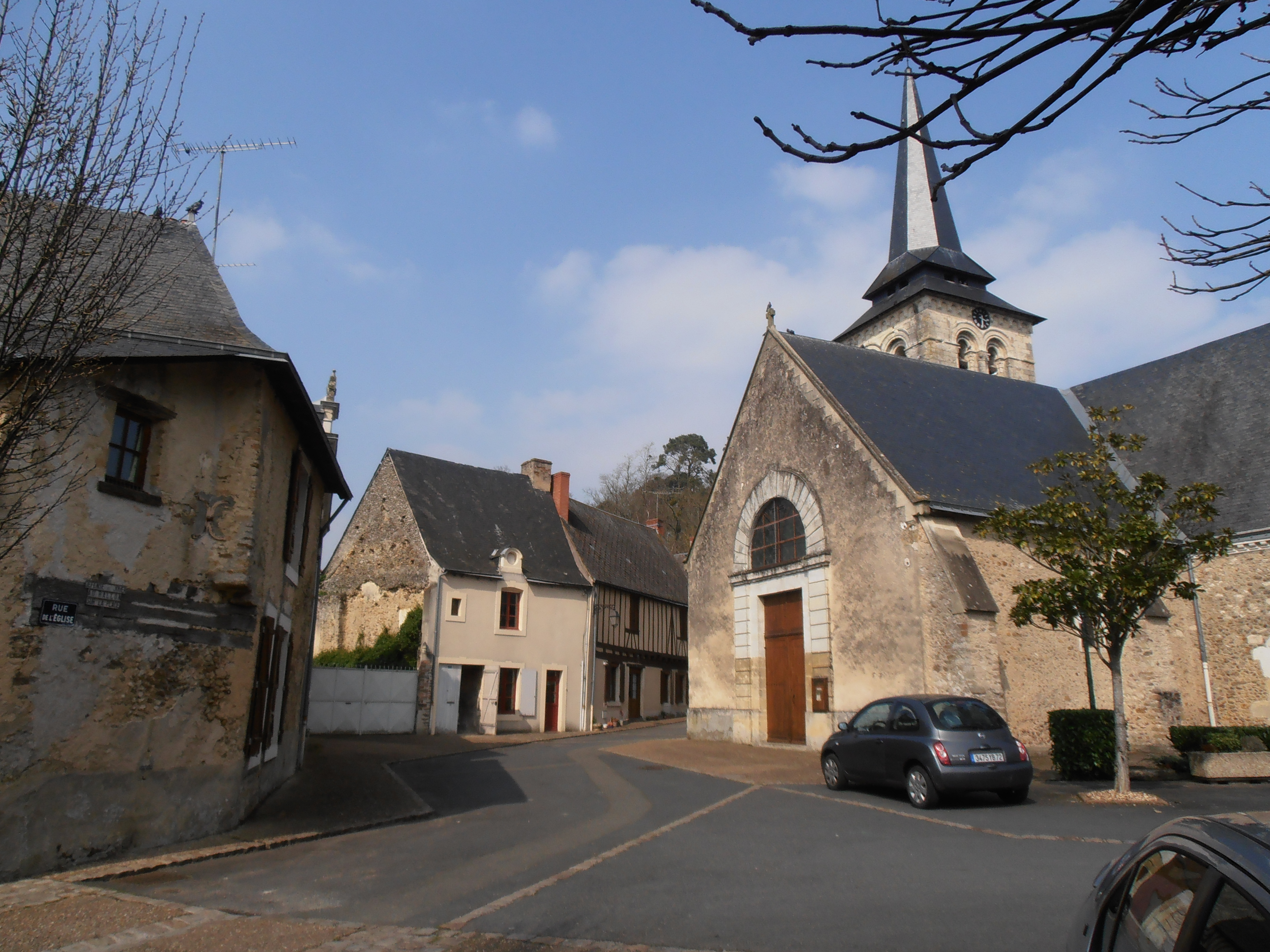 Eglise de Clermont vue de l'ancienne place de l'église. On peut voir dans le fond, derrière l'église une maison en colombage et sur la maison tout à gauche un ancien écriteau "interdit de jouer au ballon sur la place".